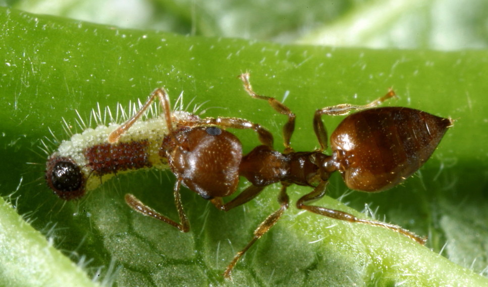 A 2012_05_27_2301_balakrishnan valappil